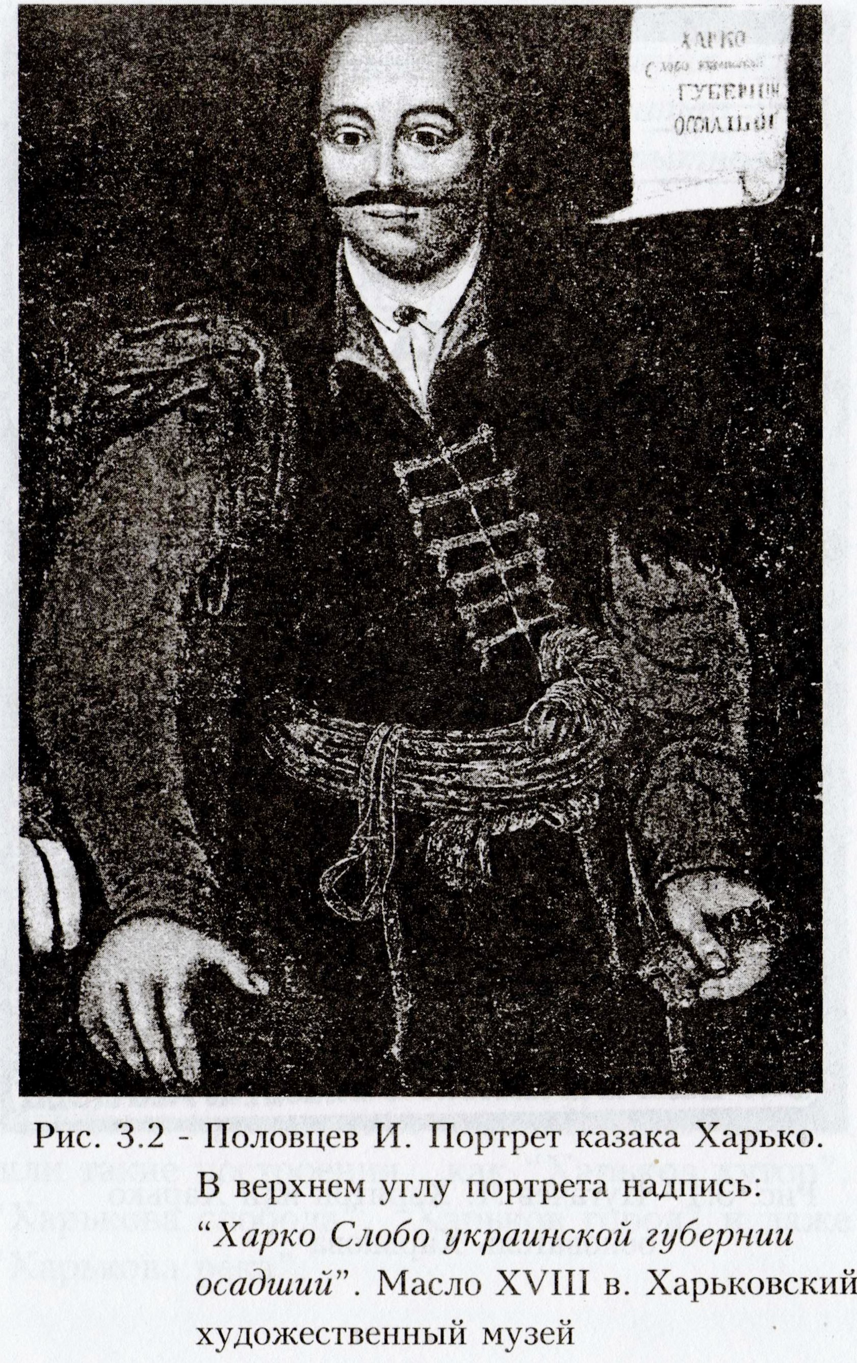 Харко Слобідської губернії осадчий. Міфічний козак Харко (Харько), нібито засновник міста Харкова. Картина В. Половцева. Полотно, олія. Харківський художній музей. Бідний слободянин-пасічник зображений у вигляді осадчого в багатому вбранні знатного шляхтича (мабуть, осадчий на ім'я Харко або Харитон ніколи й не існував)